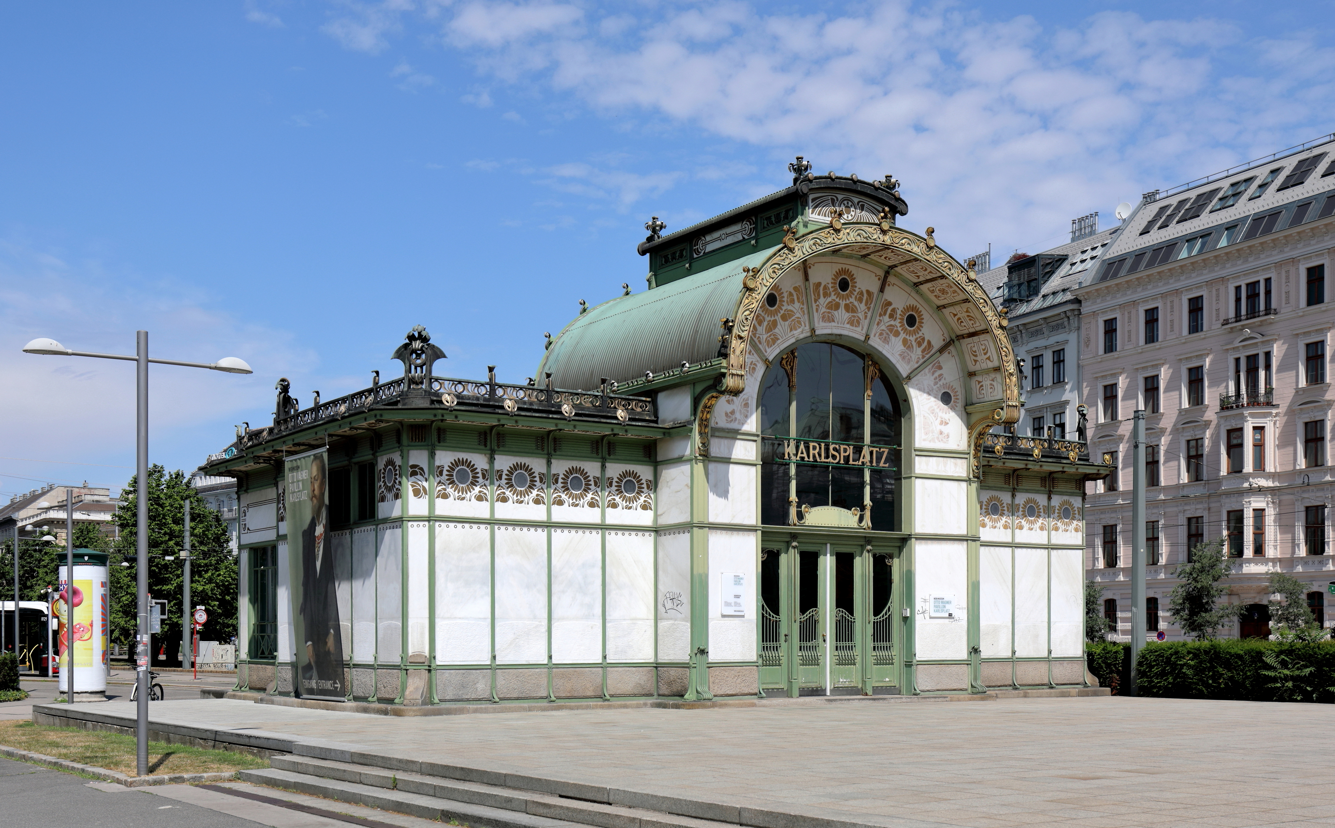 Ostansicht des ehemaligen westlichen Stadtbahn-Pavillons am Karlsplatz im 4. Wiener Gemeindebezirk Wieden.1898 wurden nach einem Entwurf von Otto Wagner zwei identische Zugangsgebäude für die Stadtbahnstation Karlsplatz errichtet. Die vielen dekorativen Details machten die Station zu einem Musterbeispiel des Wiener Jugendstils. Metall und Holz wurden in Apfelgrün gestrichen, der Signalfarbe der Stadtbahn. Hinzu kam Gold und weißer Marmor an der Außenseite. Durch den Bau der U-Bahn-Station Karlsplatz wurden die Pavillons abgetragen und nach Protesten 1977 wieder aufgestellt. Aktuell (2018) wird der westlich Pavillon von Wien Museum genutzt und der östliche als Kaffeehaus.